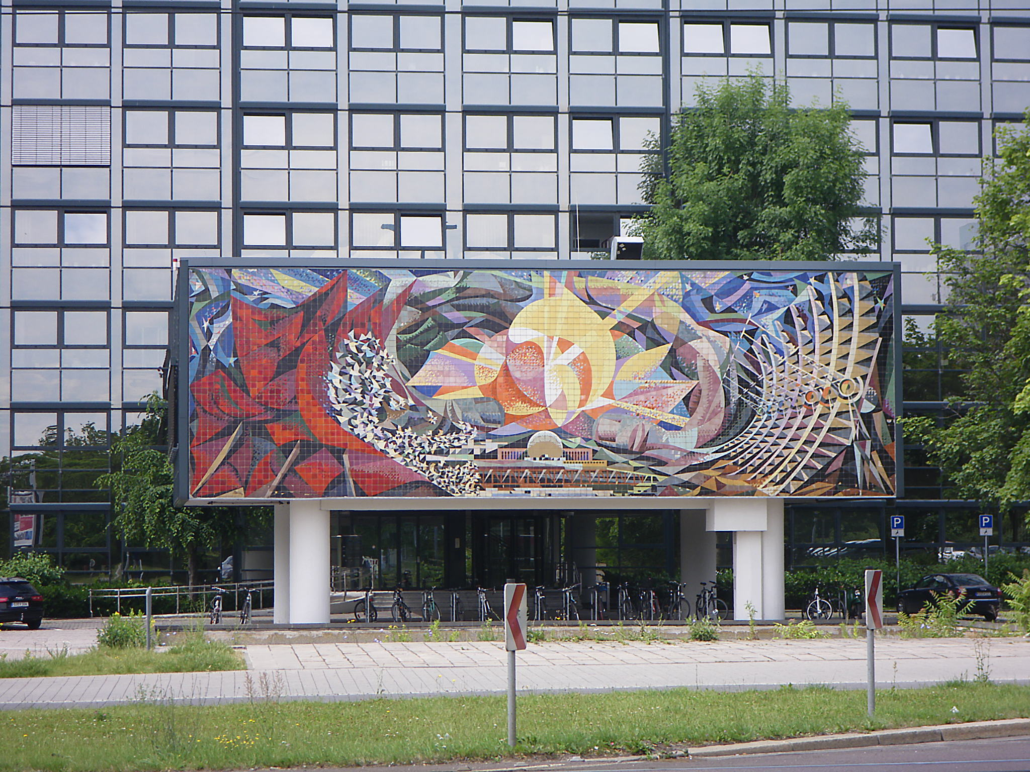 José Renau (1907-1982), Keramikbild Magdeburger Strasse